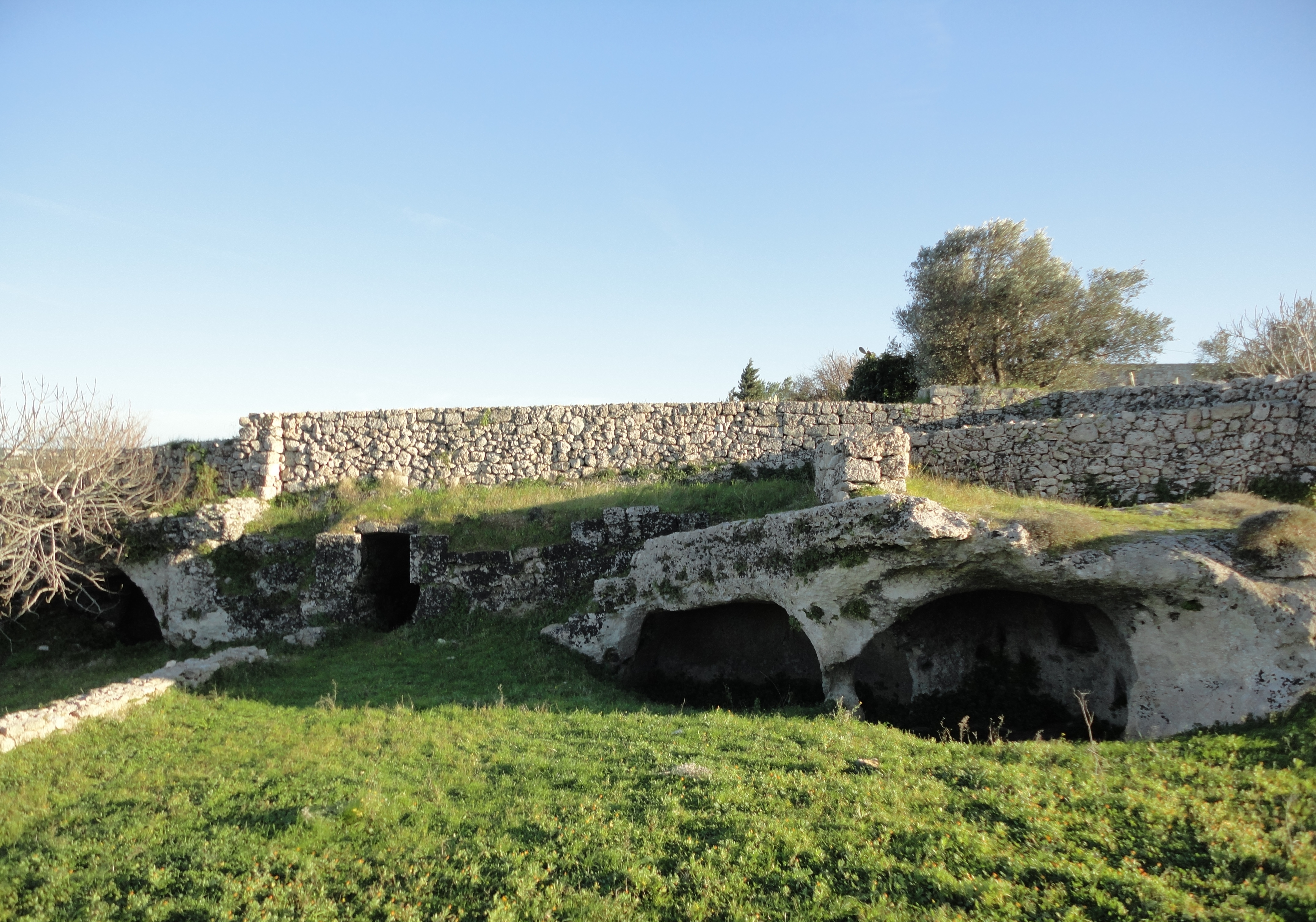 Macurano Alessano Lecce